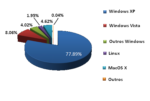 Uso de sistemas operativos